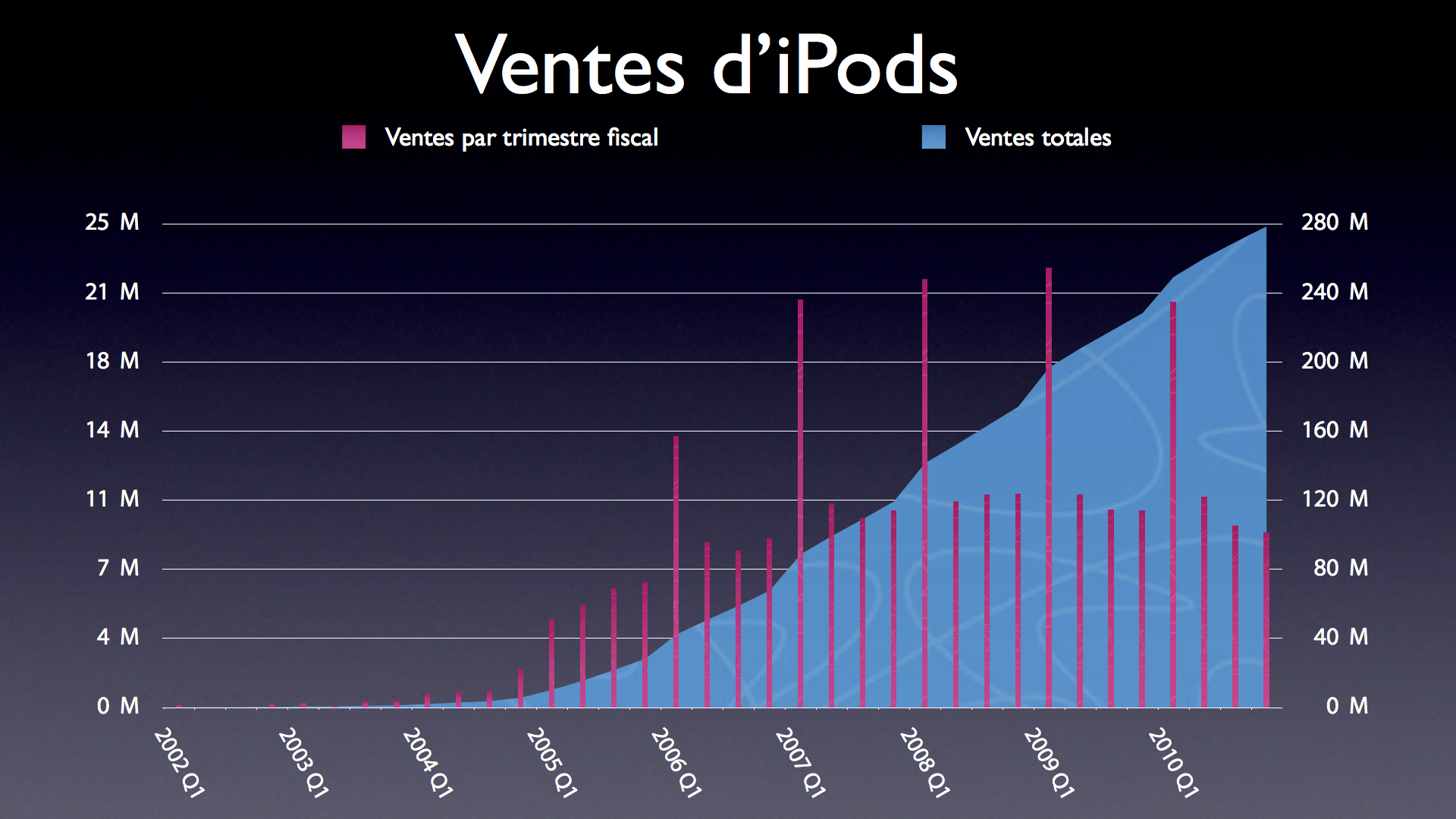 Vente d'iPods par trimestre fiscal et vente totale.